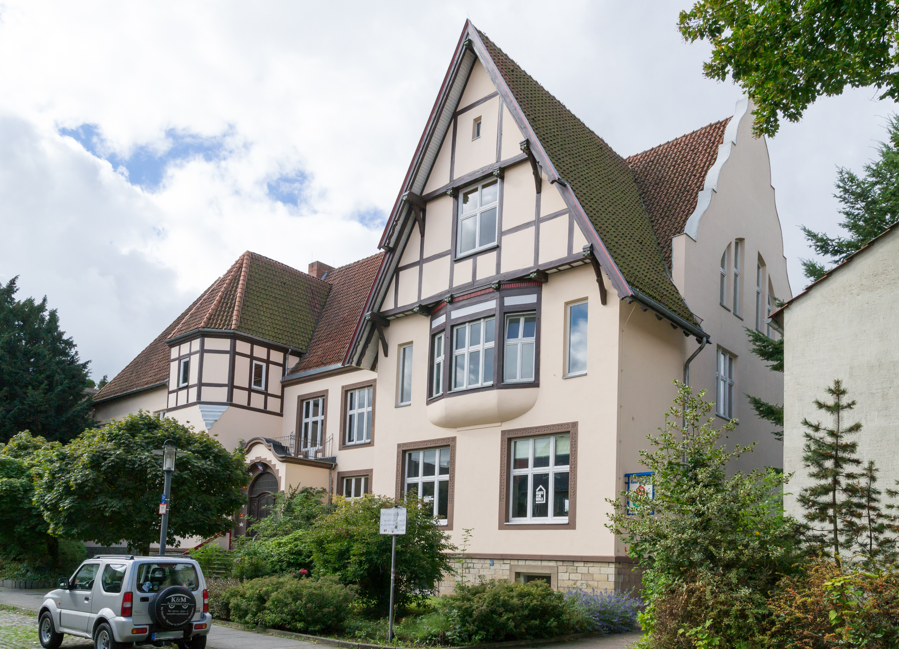 This image shows a heritage building in Germany, located in the North Rhine-Westphalian city Lemgo. ehemalige Oberschule für Mädchen